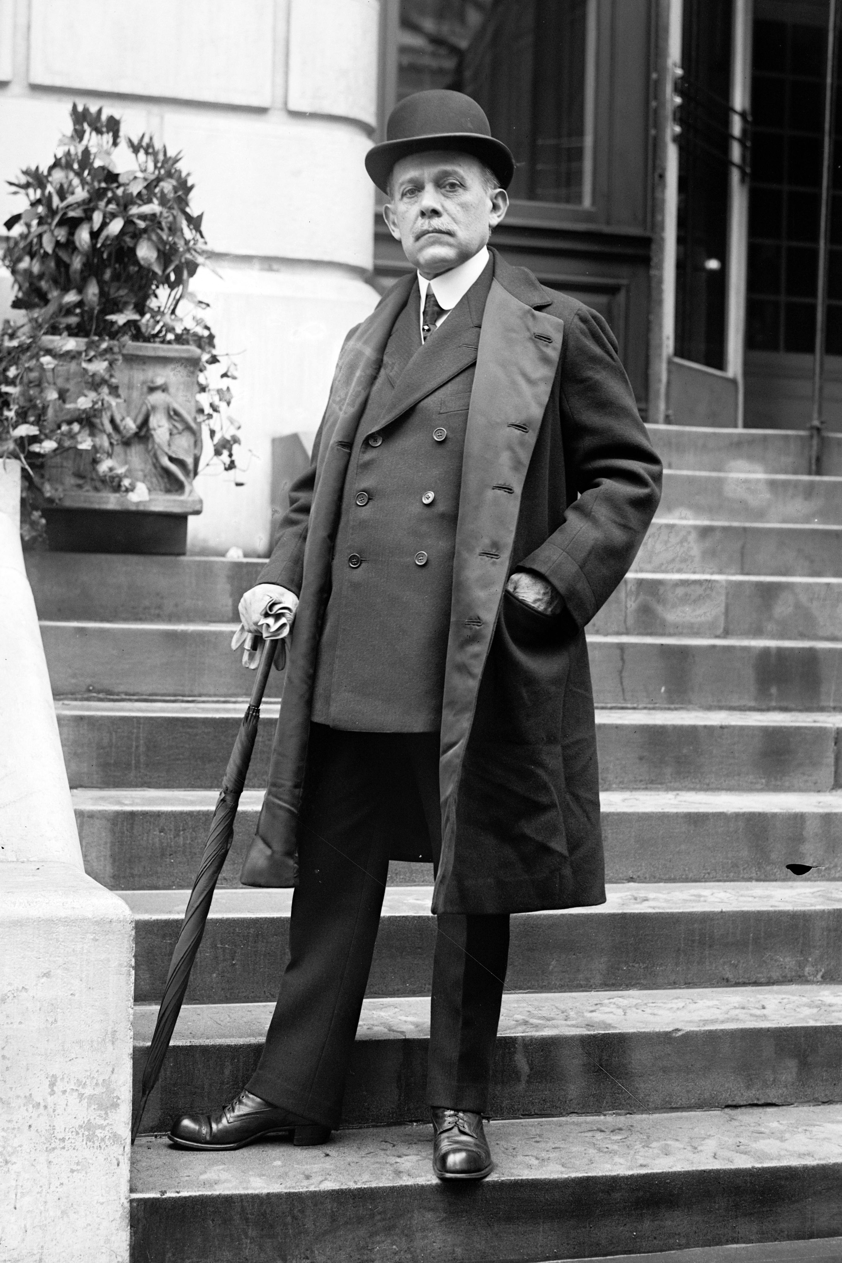 Eliodoro Yáñez Ponce de León (6 de mayo de 1860 - 26 de julio de 1932) fue un periodista, abogado y político chileno destacándose sus aportes al país en materiales laborales, educacionales y fue uno de los fundadores del diario La Nación.